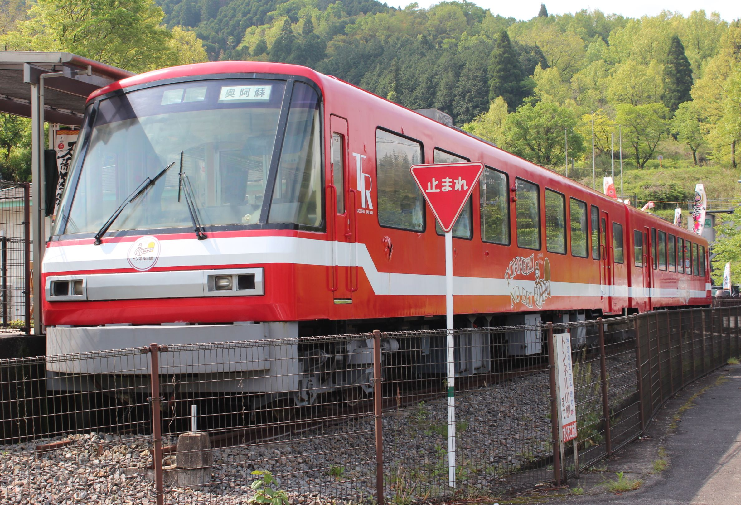 神楽酒造高千穂観光物産館トンネルの駅にて保存されている気動車